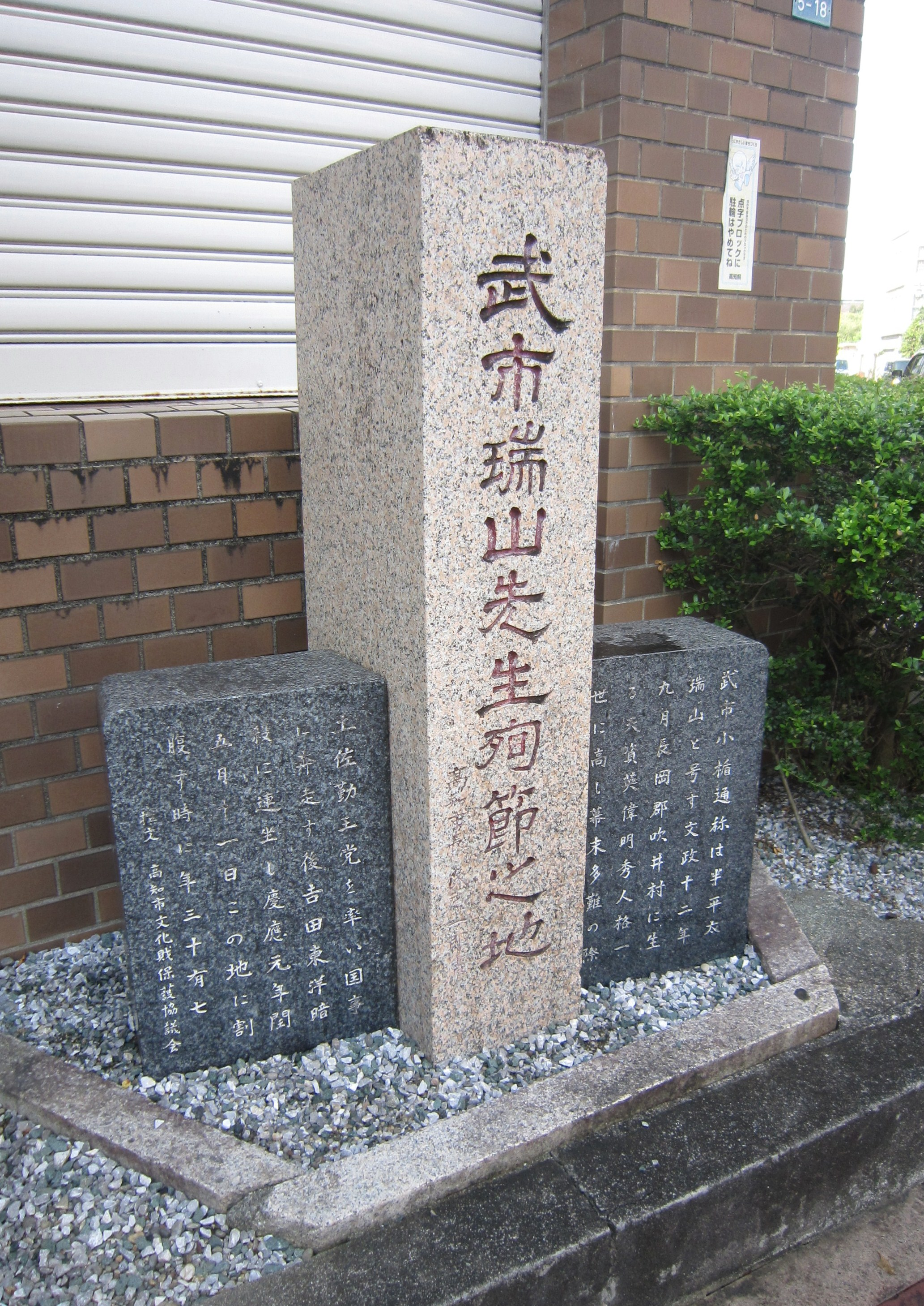 武市瑞山殉節地、高知県高知市